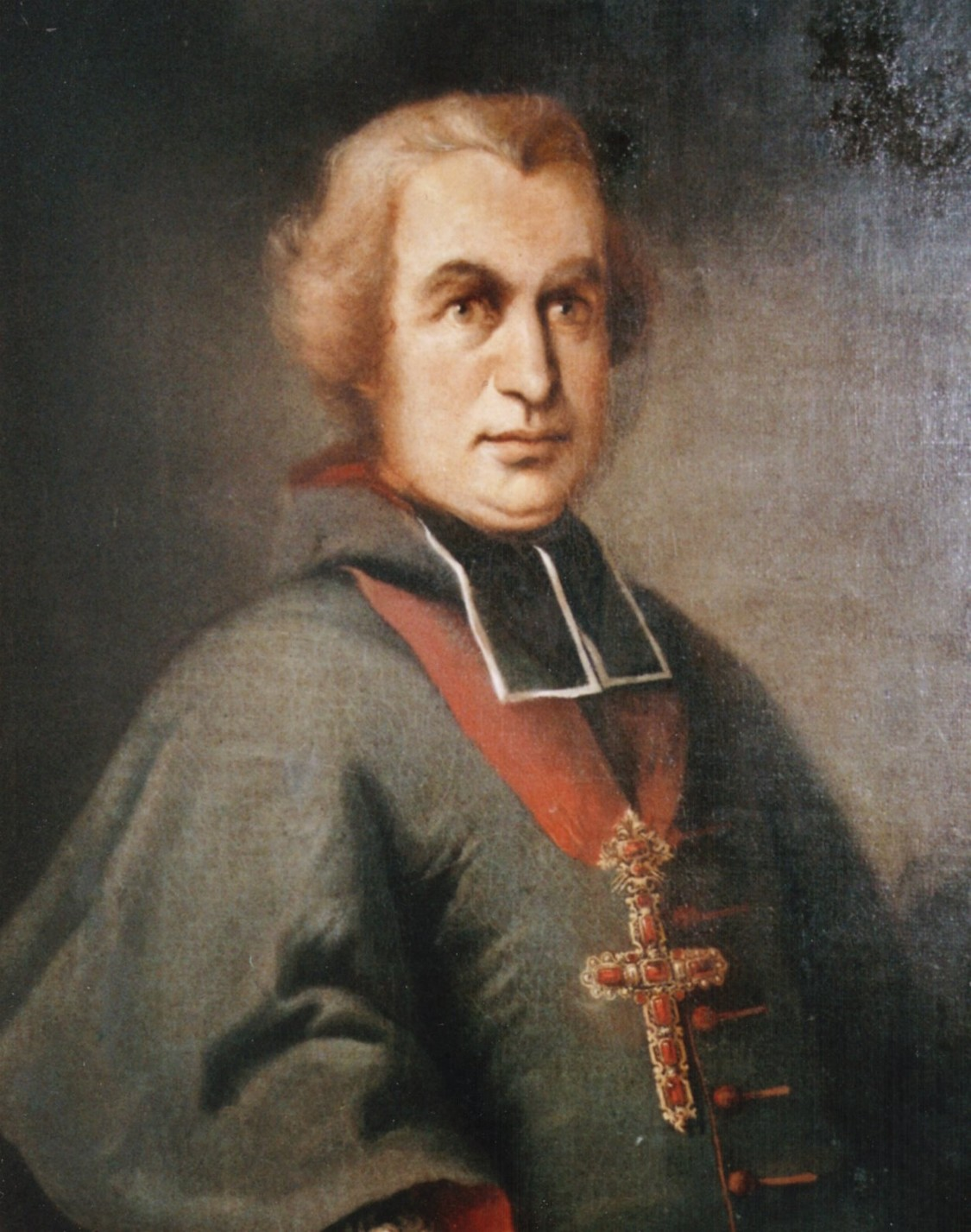 Cajetan Anton Notthafft von Weißenstein als Stiftskapitular in Berchtesgaden (Ölgemälde aus Privatbesitz, derzeit im Kunstmarkt, mit seinem Partnerbild einer Dame, die Leiterin des Heimatmuseums in Berchtesgaden war der Meinung dass es sich bei dem Abgebildeten nicht um einen Notthafft sondern einen Schönborn handle)